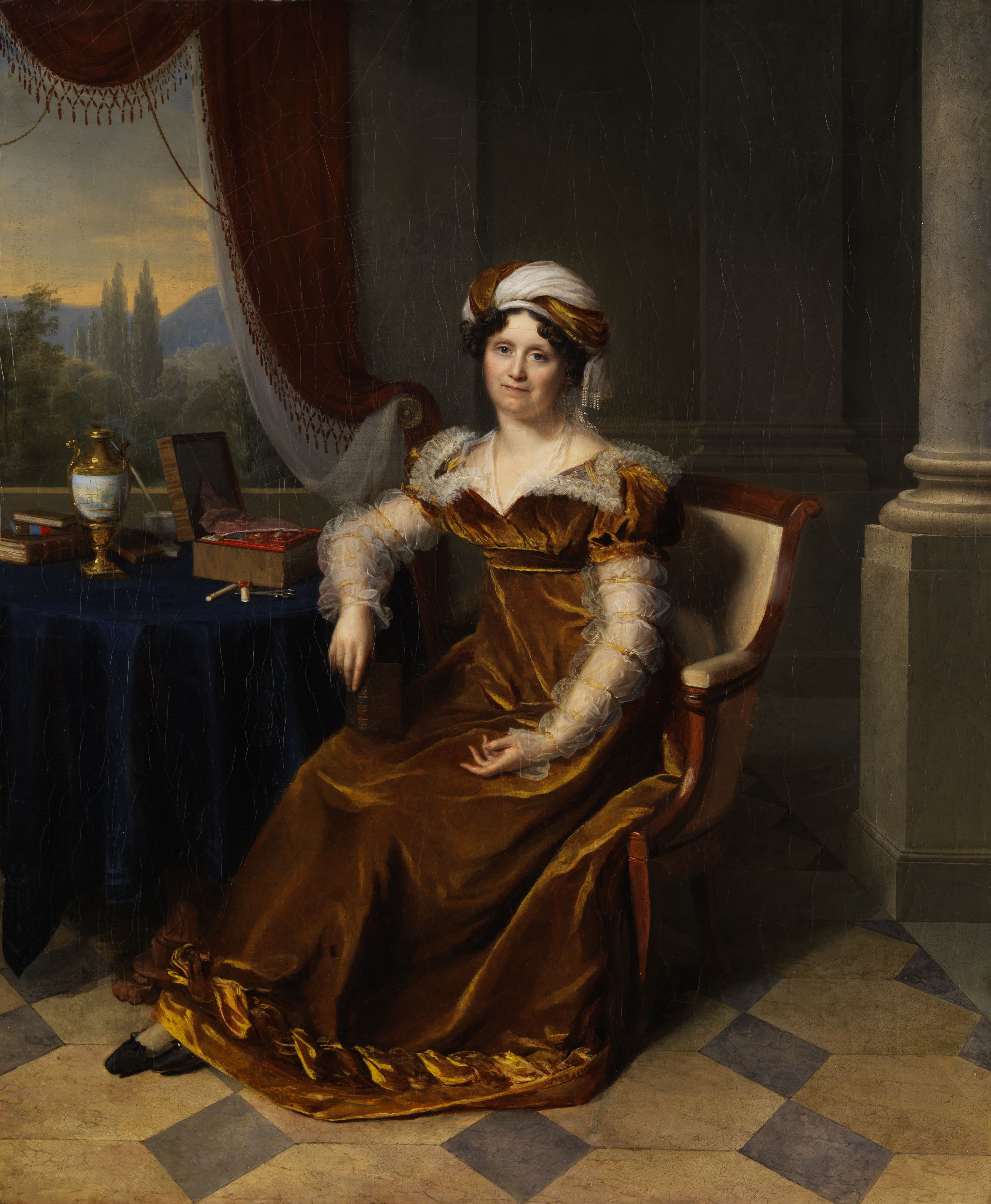 Portrait der Madame Marbon